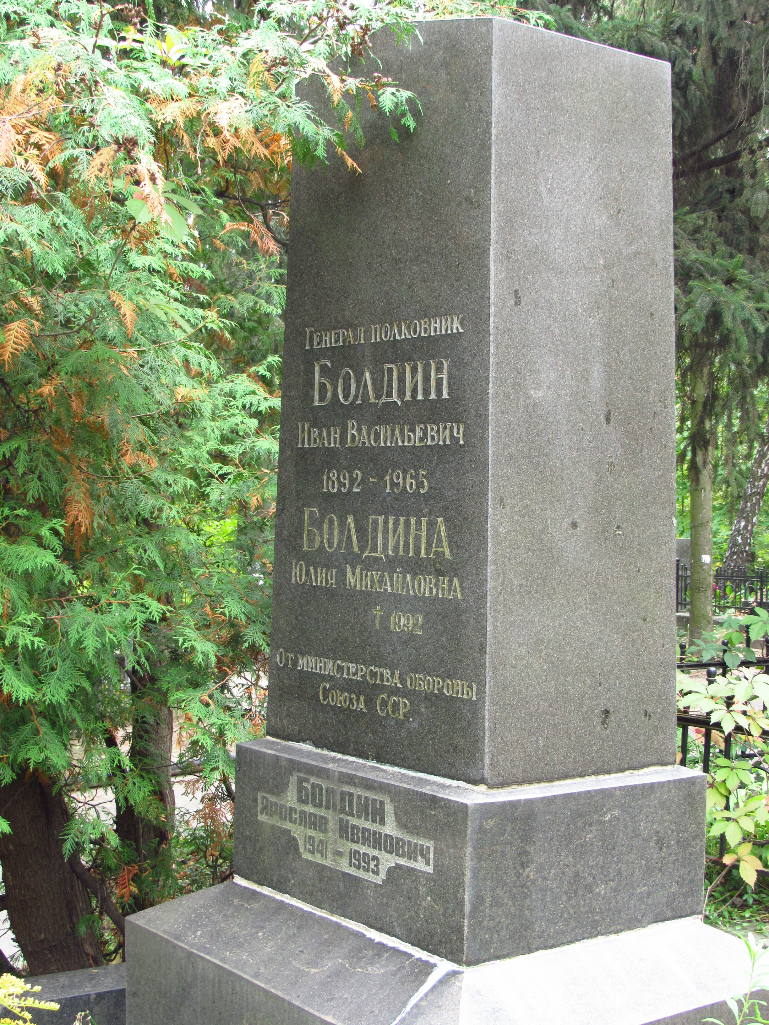 Могила Болдіна І. В., Київ, Байкова вул., 6, діл. 46